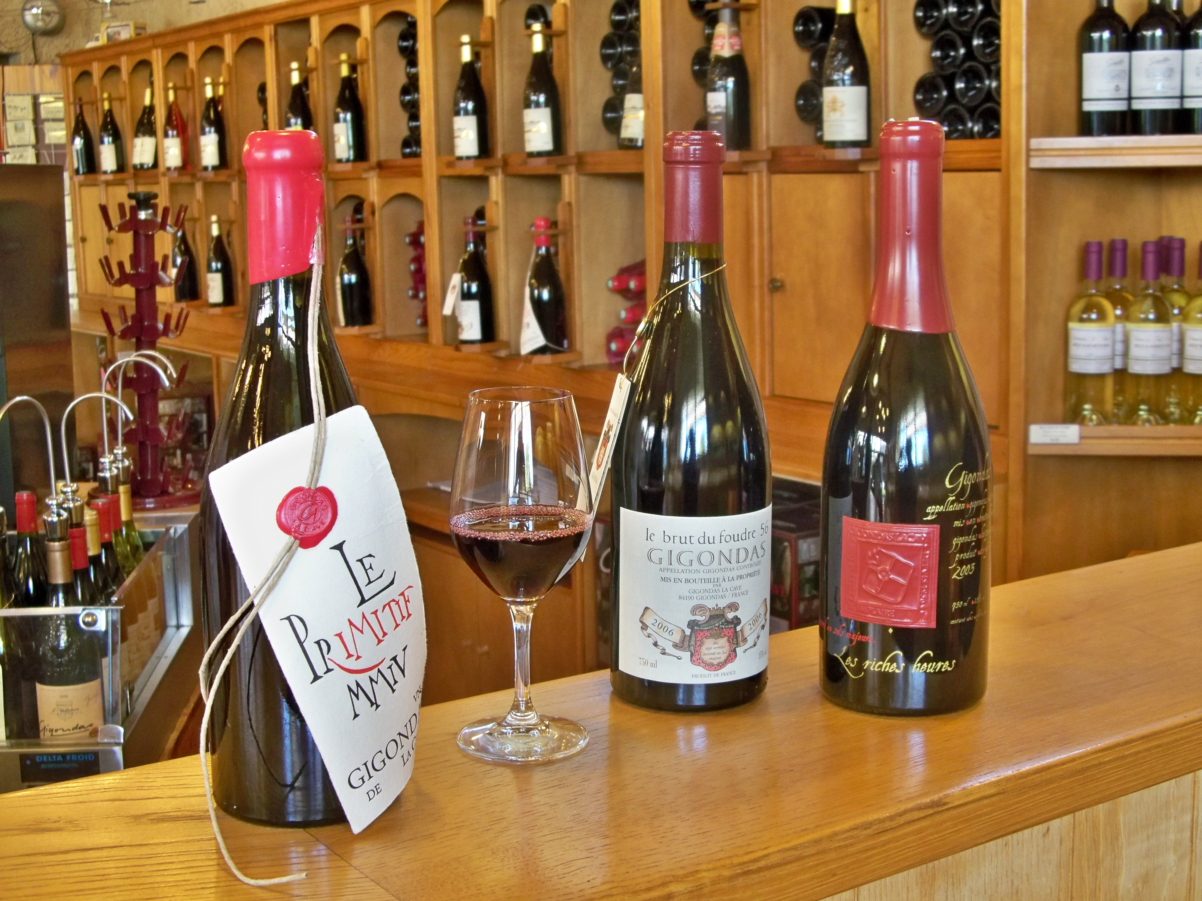 Boutielles de vins de Gigondas, Vaucluse